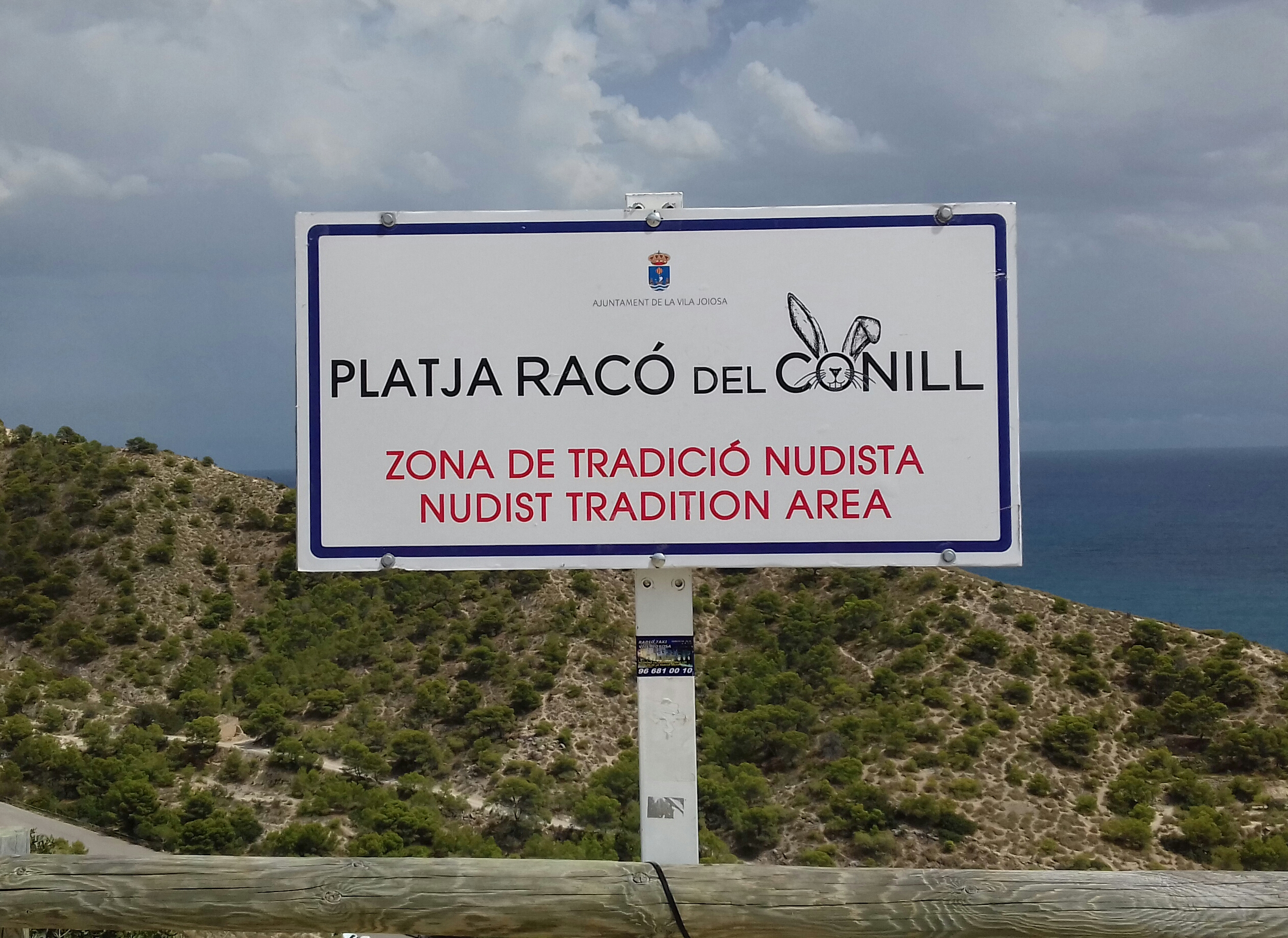 Cartel del Ayuntamiento de Villajoyosa reconociendo la tradición nudista de la playa